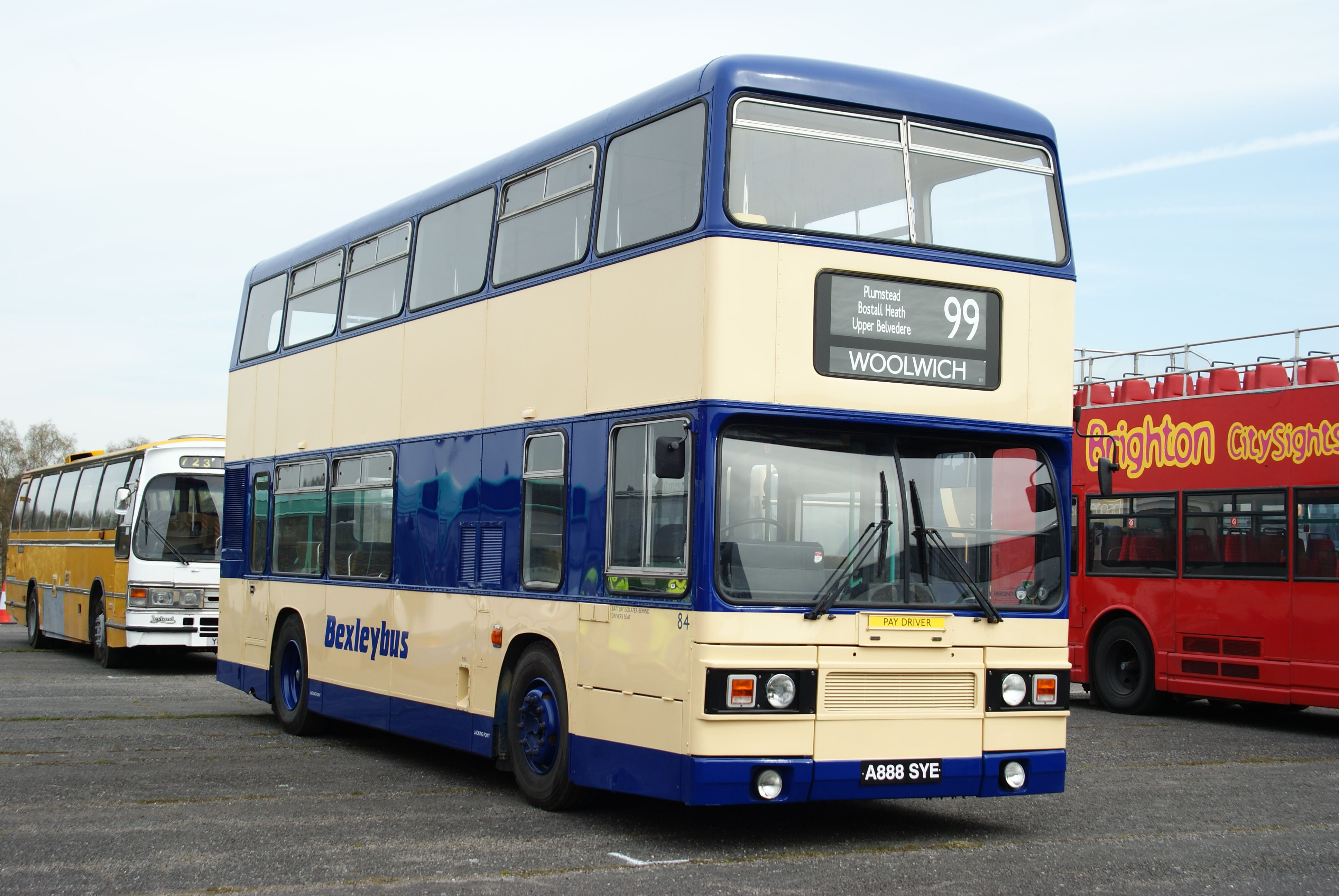 A888SYE 110410 CPS